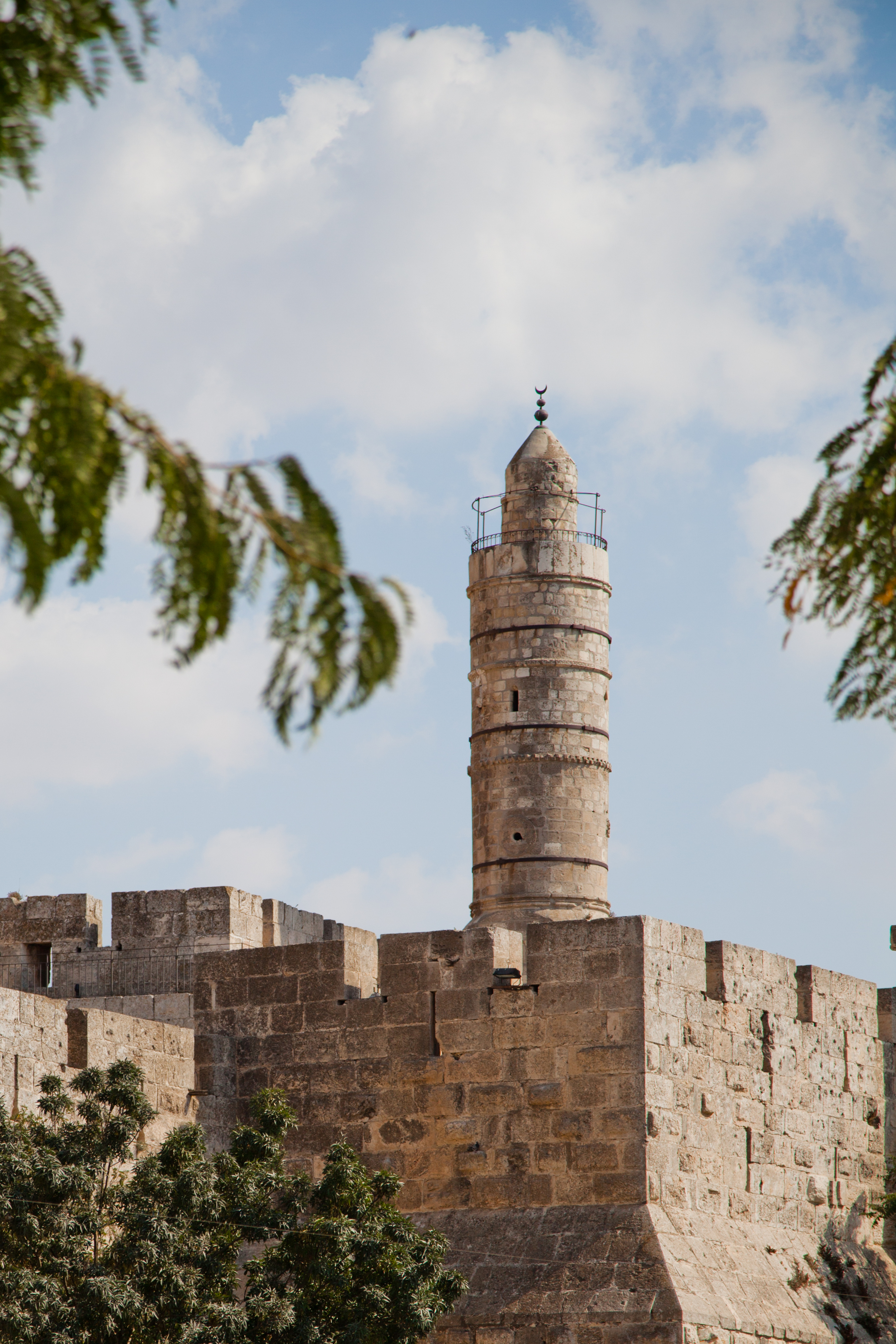 מגדל דוד כפי שנראה משער יפו.